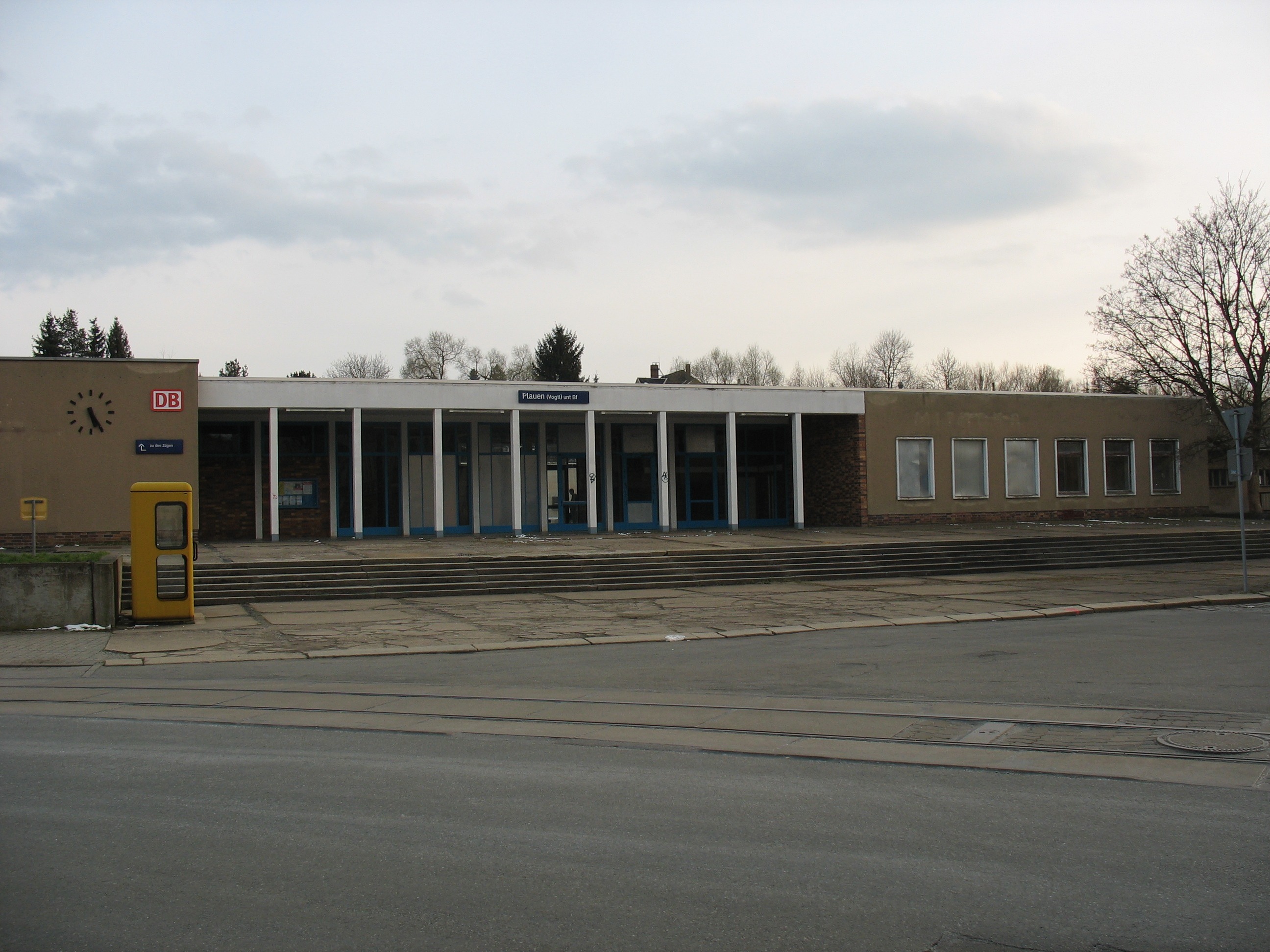 Plauen, Gebäude des Unteren Bahnhofs, mittlerweile geschlossen. Ansicht von der Straße Am unteren Bahnhof.